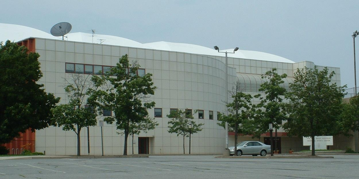 Pizzitola Sports Center, el pabellón de baloncesto.